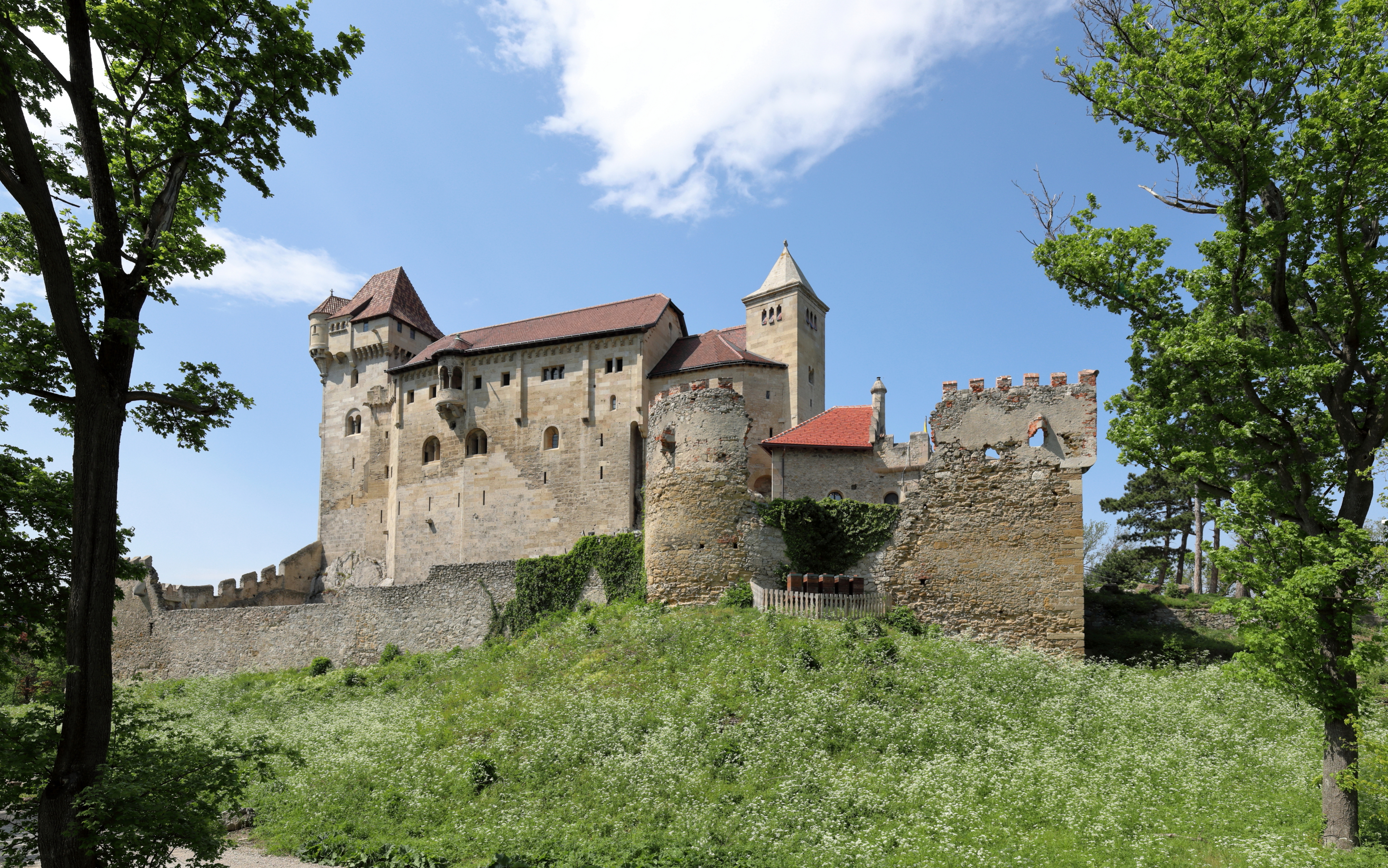 Südostansicht der Burg Liechtenstein in der niederösterreichischen Marktgemeinde Maria Enzersdorf.Eine weithin sichtbare und hoch aufragende mächtige romanische Burg, die bis ins 17. Jahrhundert mehrfach verändert, erweitert bzw. nach Zerstörungen wiederaufgebaut wurde. Bei der Türkenbelagerung 1683 wurde sie stark beschädigt und war anschließend eine Ruine, die erst ab dem Anfang des 19. Jahrhundert unter Einbeziehung der mittelalterlichen Anlage wiederaufgebaut bzw. rekonstruiert und erweitert wurde.